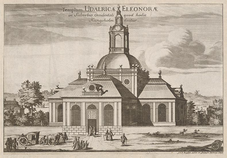 Templum Udalricae Eleonorae in Suburbio Occidentali quod hodie Kungsholm dicitur : [Bild] / j.v.d. Aveelen delin. et sculpsit